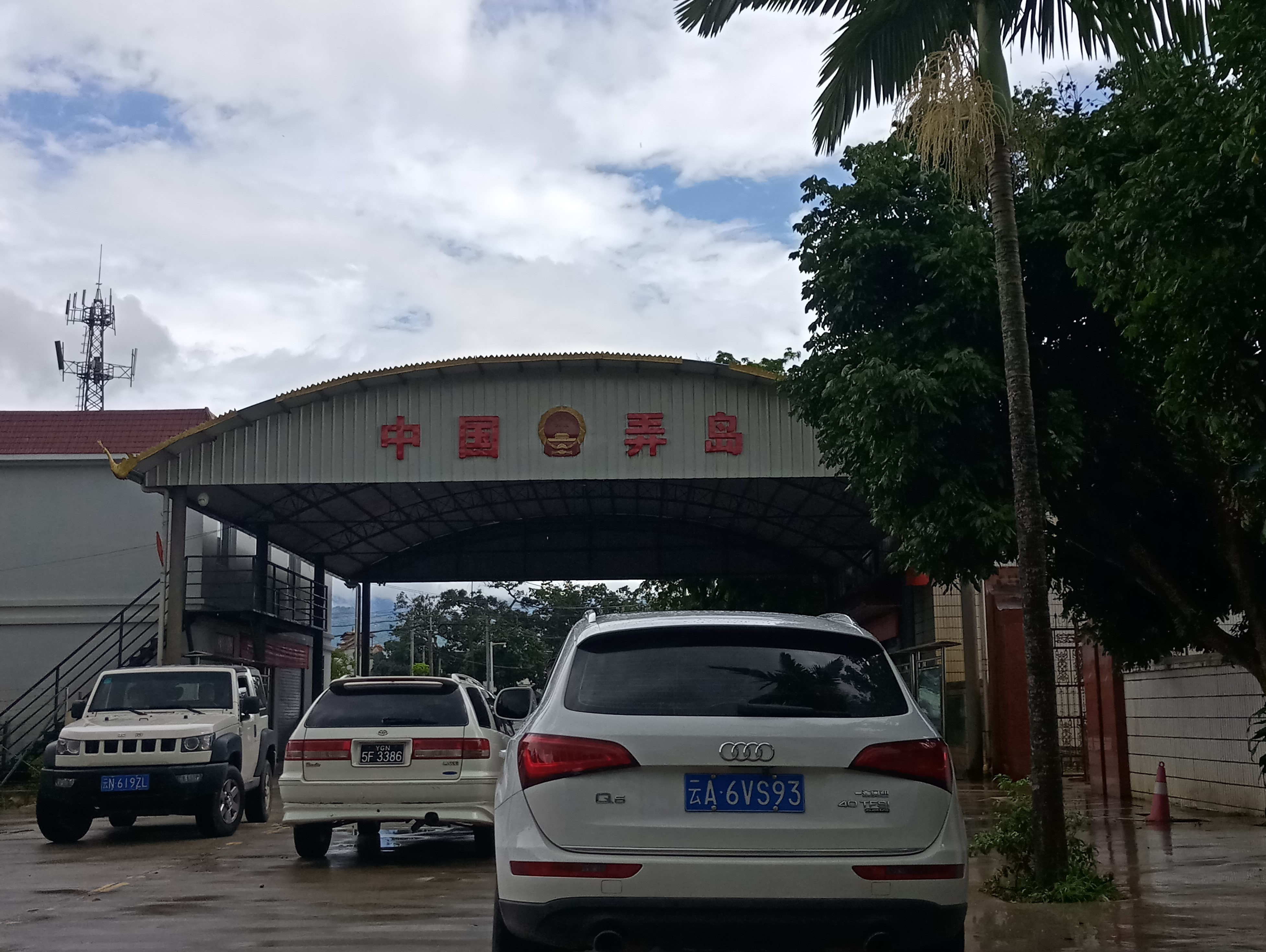 中文（中国大陆）: 瑞丽市中缅边界弄岛通道